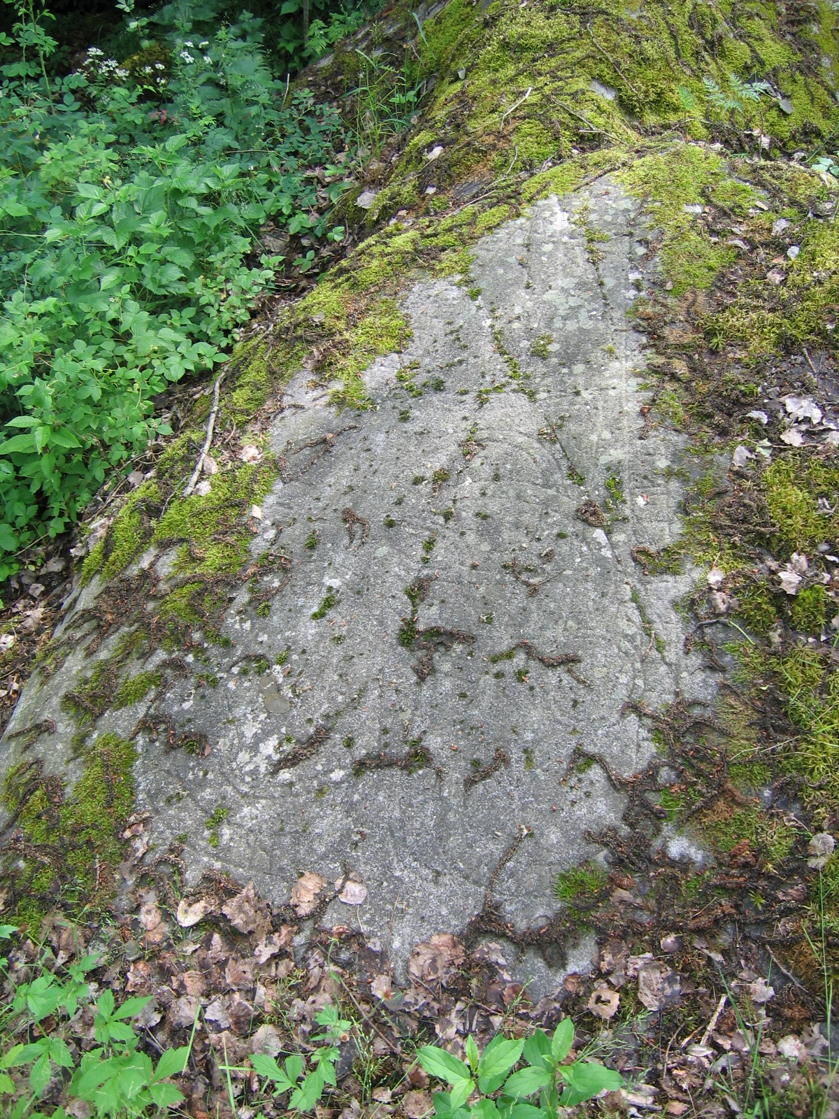 runic inscription